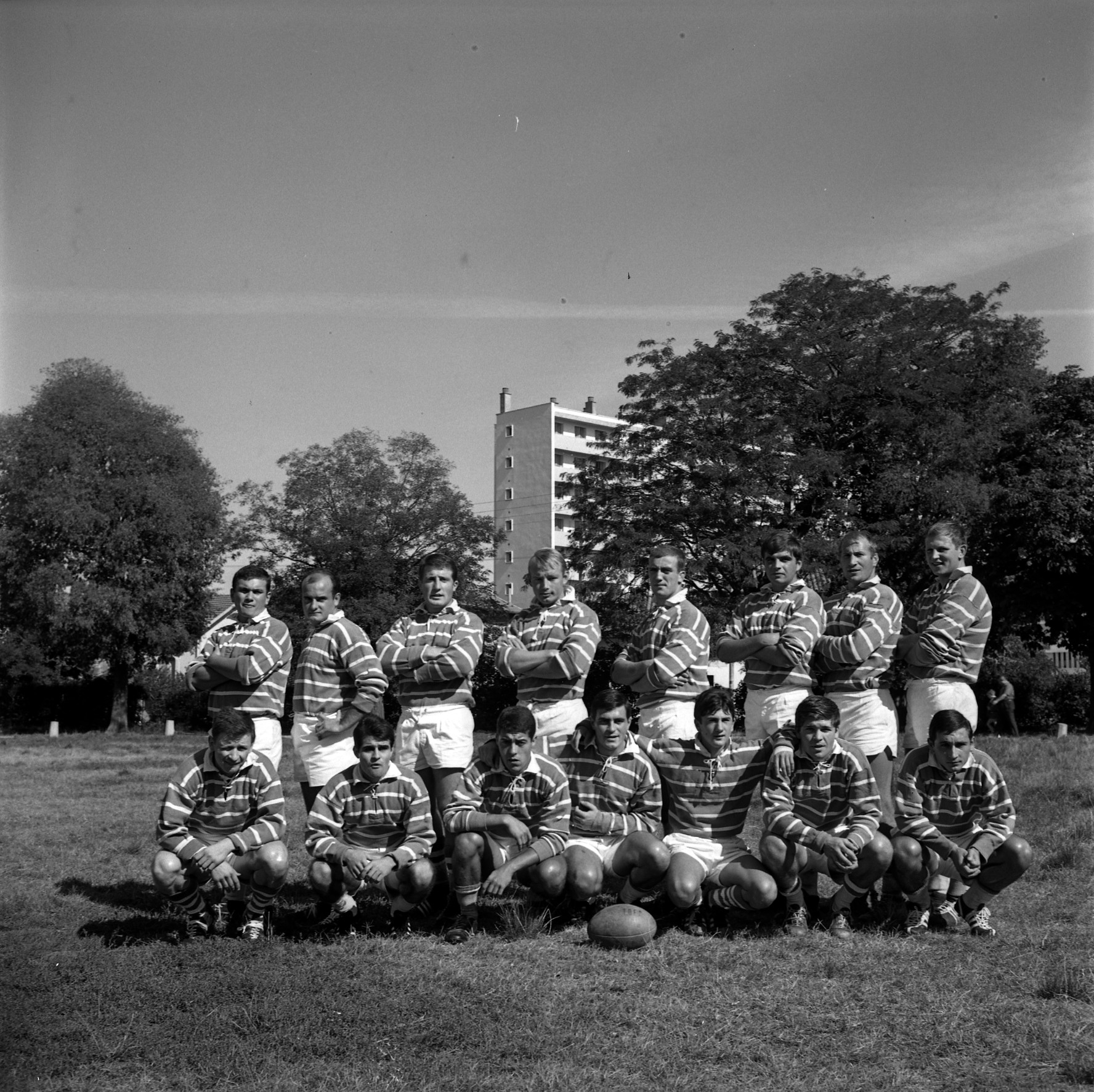 Stade du TOEC. Le 11 Septembre 1965. Vue de l'effectif complet du TOEC posant pour la photo lors de la saison 1965-1966.